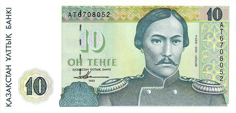 10 тенге 1993 года